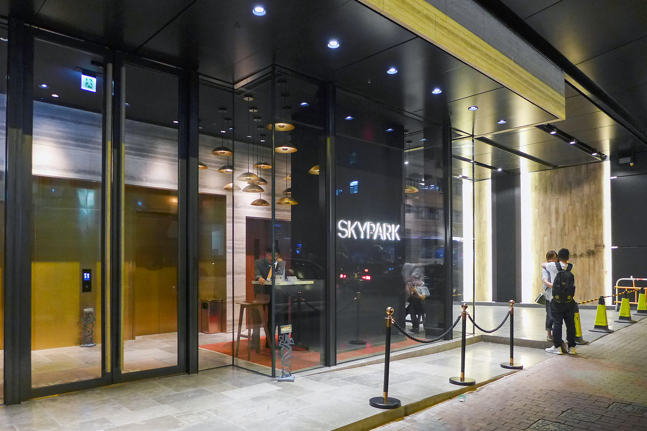 Skypark Entrance